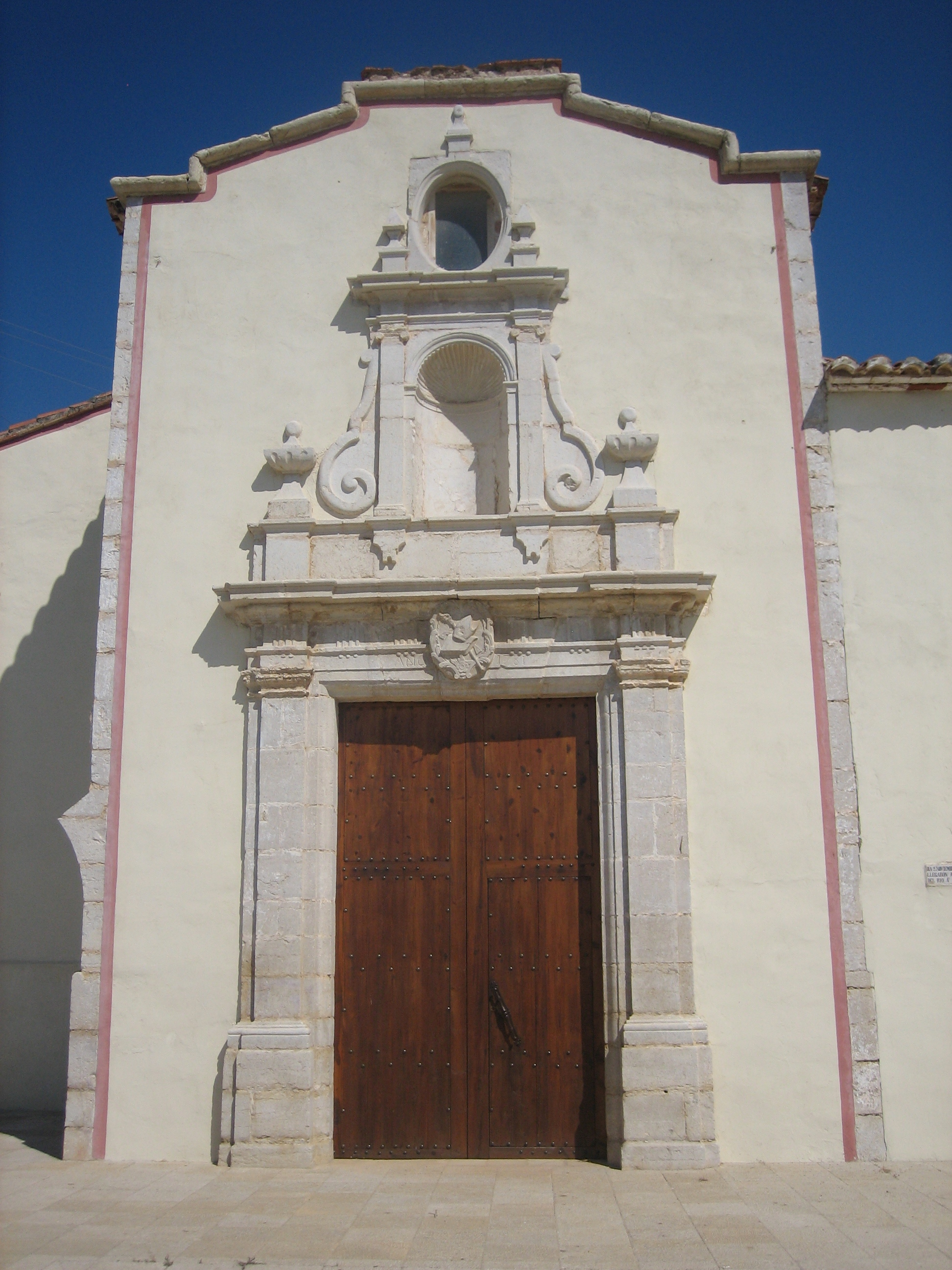 Portada de l'ermita de Sant Gregori de Vinaròs (Baix Maestrat)